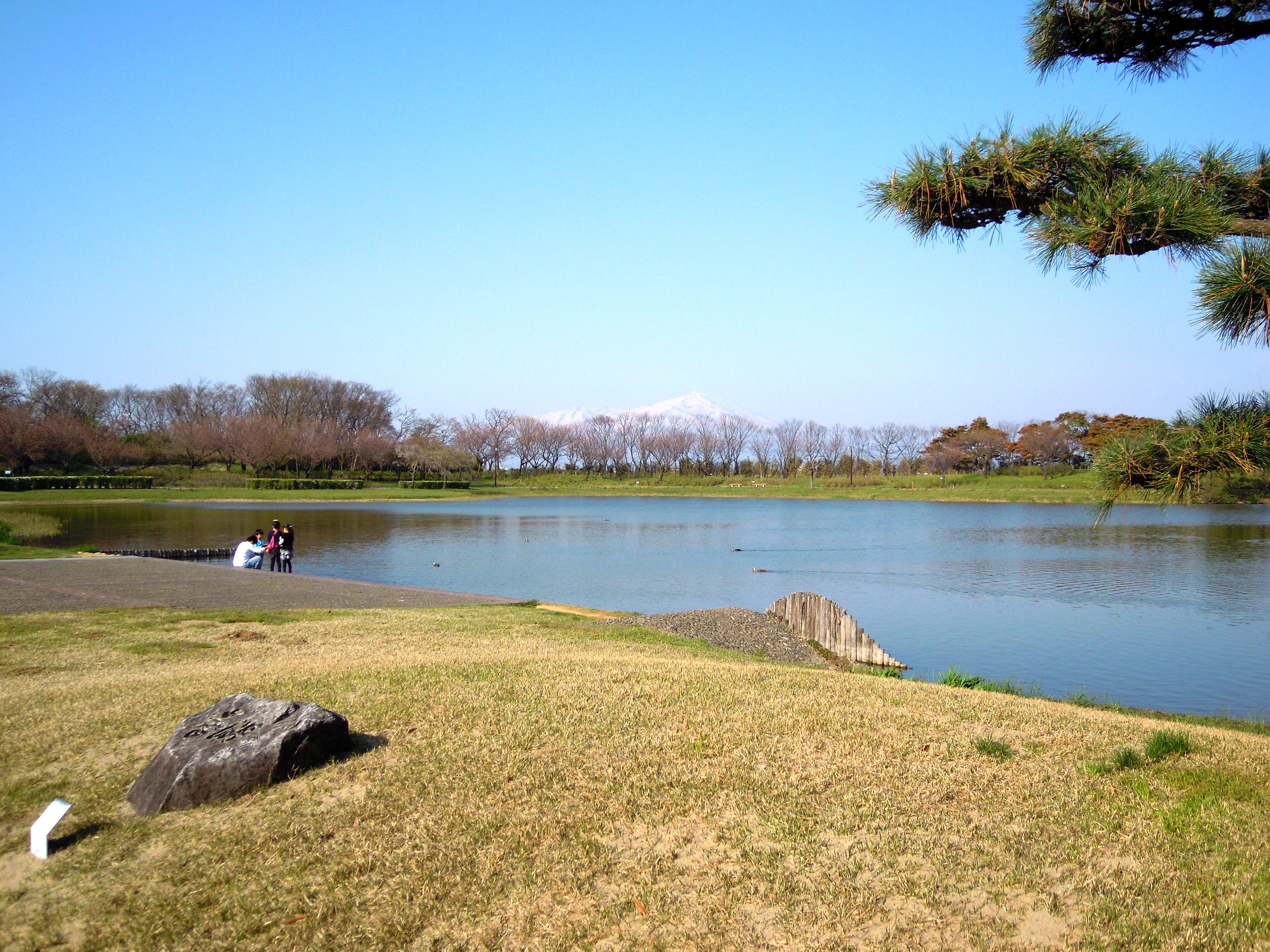 山形県酒田市の飯森山公園内にある白鳥池。奥に見えるのは鳥海山。